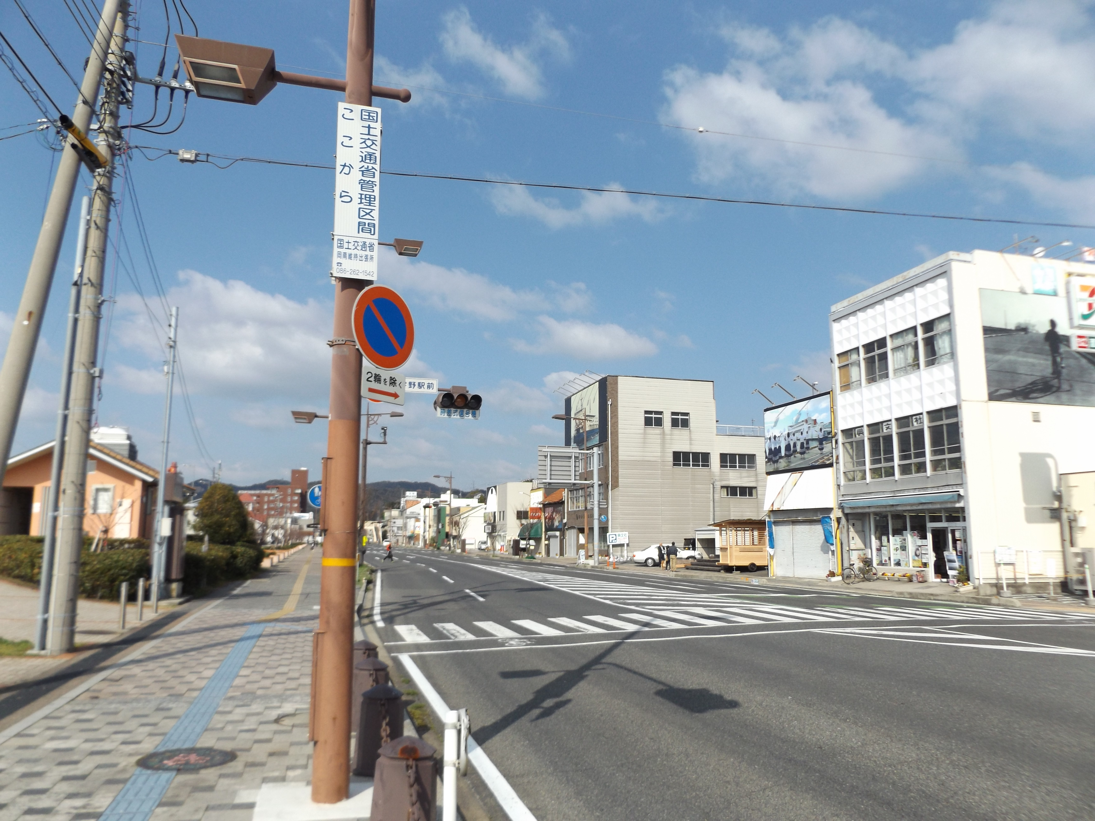 岡山県玉野市の宇野駅前交差点。国道30号の岡山県（本州）側区間はここまでで、この先は海上区間を経て香川県（四国）に至る。